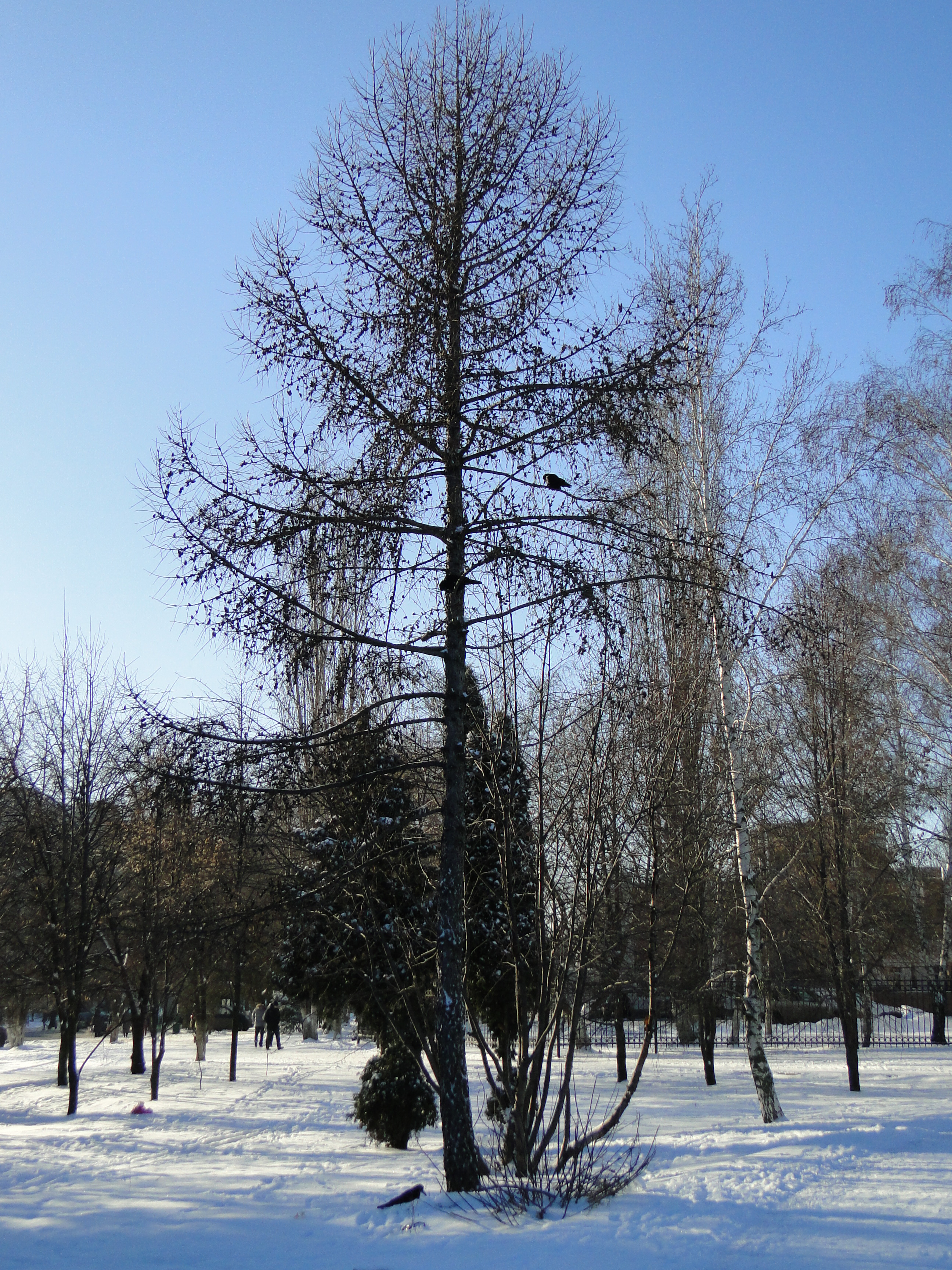 Январь